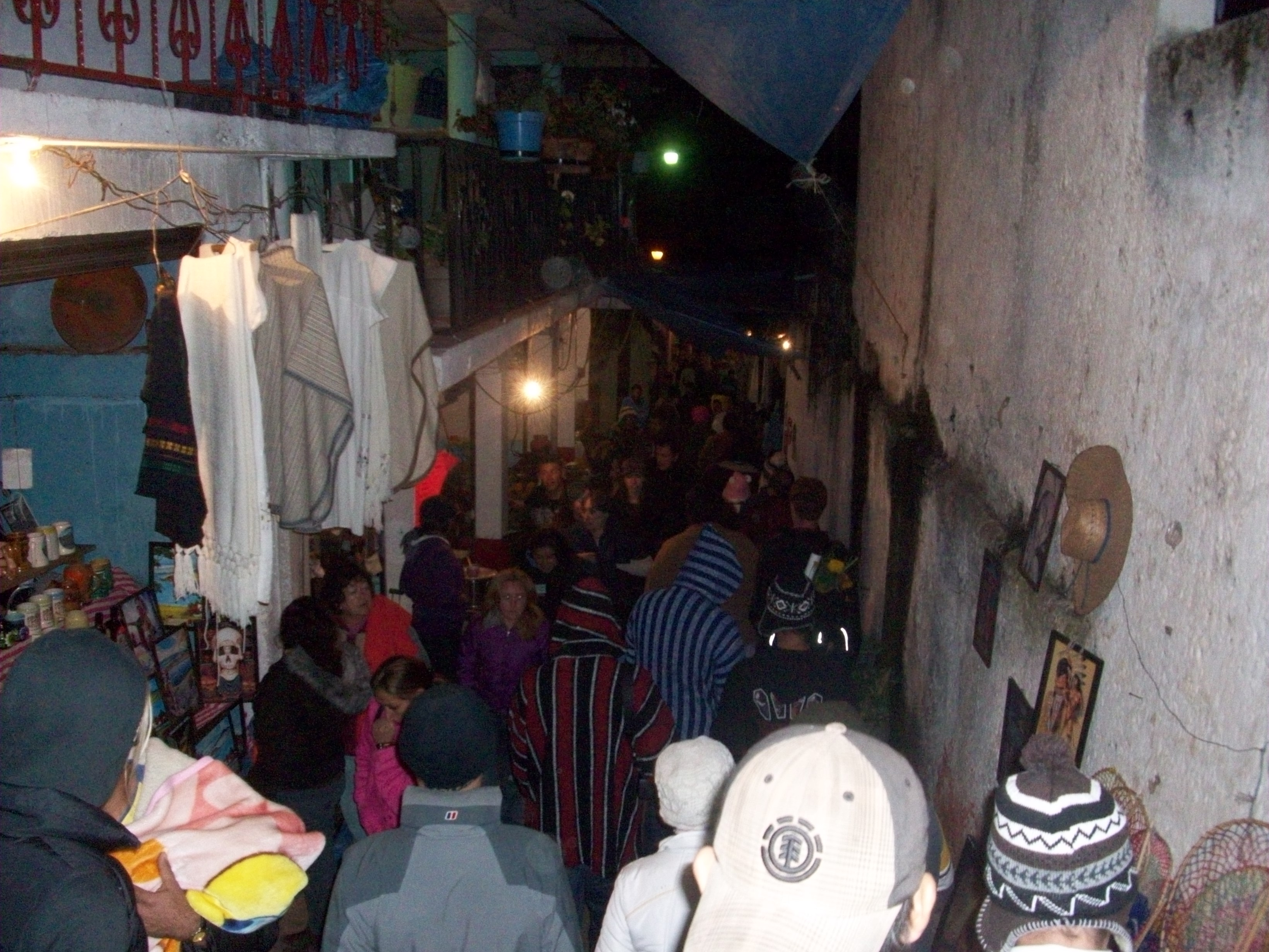 En la imagen, las personas que caminan por las pequeñas calles empedradas de Janitzio, el día de la celebración de día de Muertos.